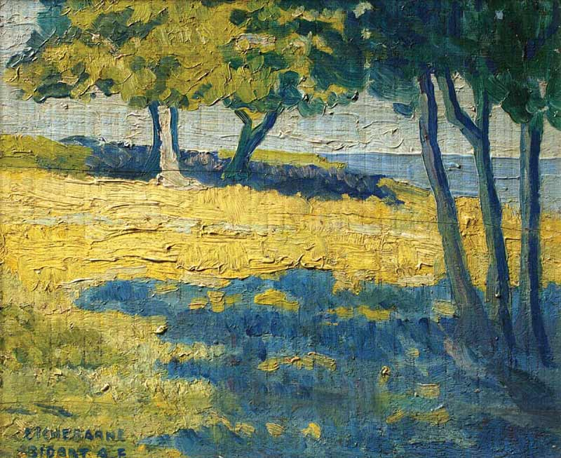 Obra del pintor uruguayo Andrés Etchebarne Bidart (1889-1931) “Primavera”, óleo sobre tabla de 25 x 30 cm.